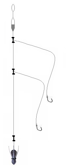 Montage en pater noster pour surfcasting